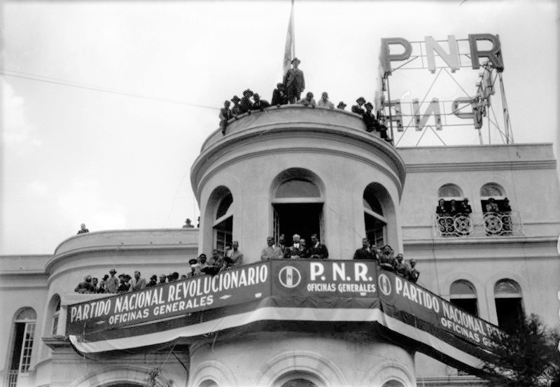 Manifestación en apoyo del candidato presidencial Pascual Ortiz Rubio, el 29 de junio de 1930, desde el balcón de la sede del Partido Nacional Revolucionario en las calles General Prim número 128 y Paseo de la Reforma.